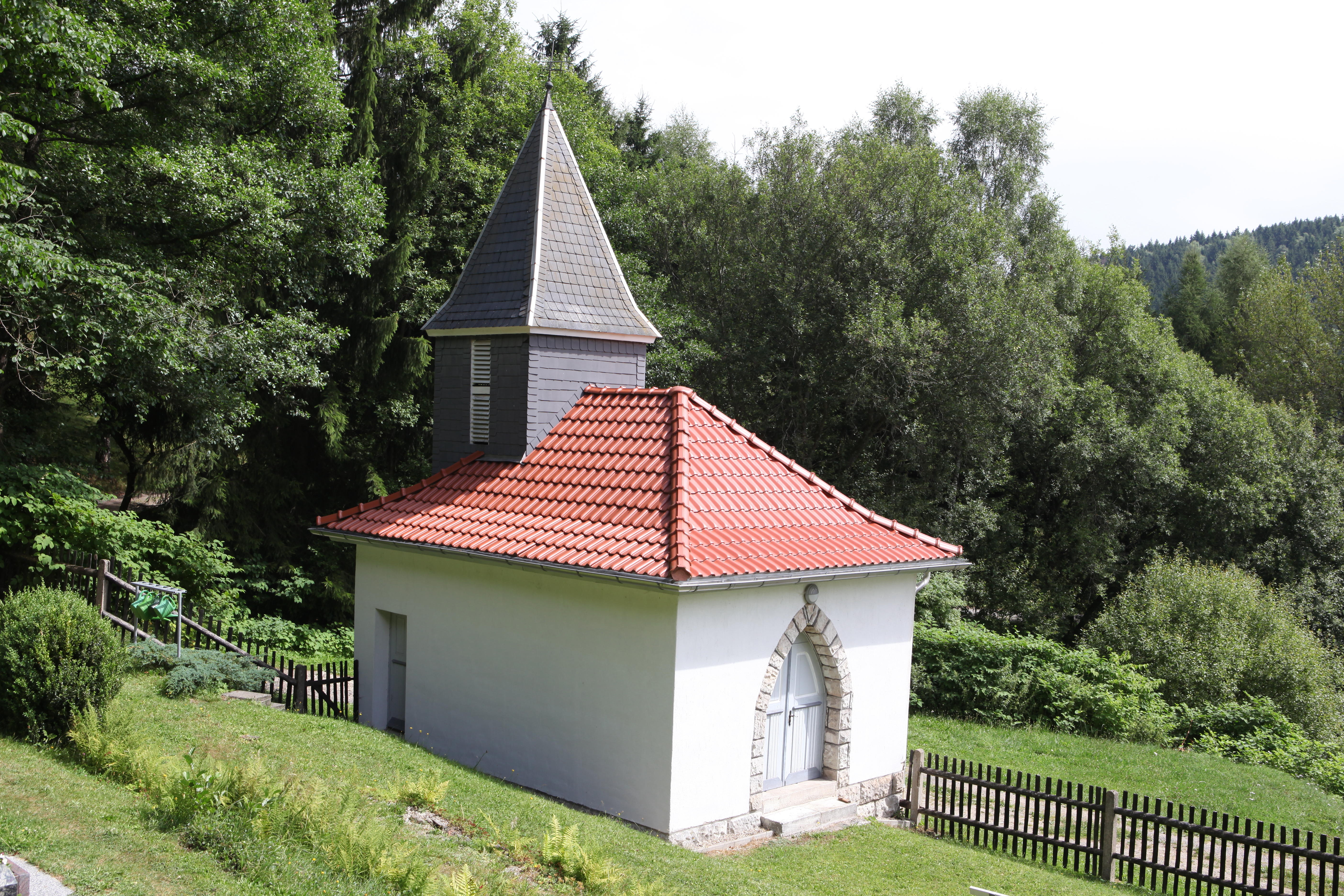 Bergkapelle, Friedhof in Einsiedel